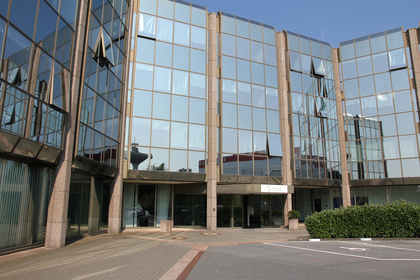 Gebäude gkv informatik